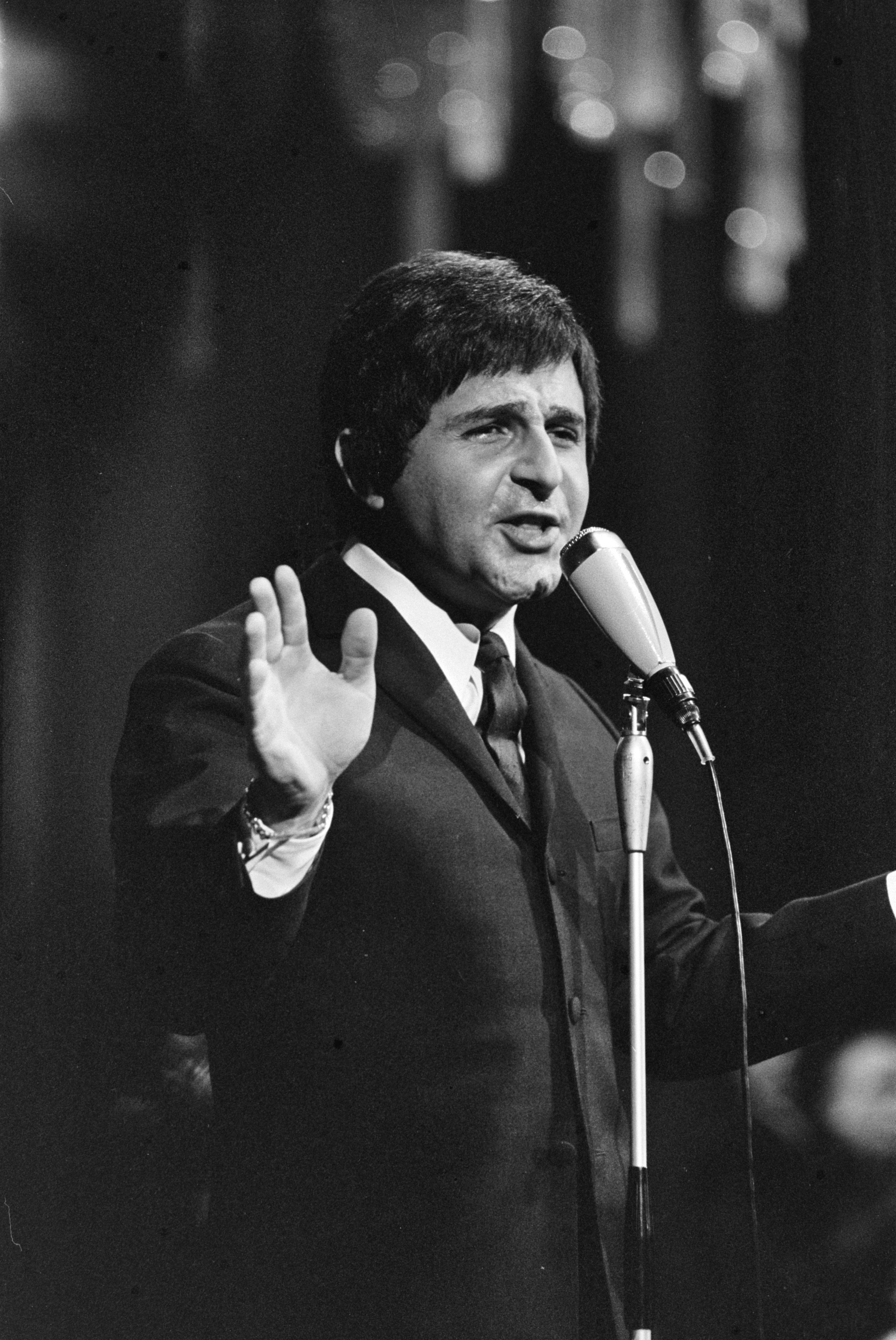 Collectie / Archief : Fotocollectie Anefo Reportage / Serie : Grand Gala du Disque in het concertgebouw te Amsterdam Beschrijving : Optreden van de Franse zanger Richard Anthony Datum : 2 oktober 1966 Locatie : Amsterdam, Noord-Holland Trefwoorden : zangers Persoonsnaam : Anthony, Richard Fotograaf : Fotograaf Onbekend / Anefo Auteursrechthebbende : Nationaal Archief Materiaalsoort : Negatief (zwart/wit) Nummer archiefinventaris : bekijk toegang 2.24.01.05 Bestanddeelnummer : 919-6273 Reacties Geplaatst door Geschiedenismens - Muziek op 26 november 2017 - 22:15. Grand Gala du Disque Populaire in het RAI congrescentrum Datum: 01 oktober 1966 (locatie Concertgebouw is onjuist en datum 2 oktober is onjuist)